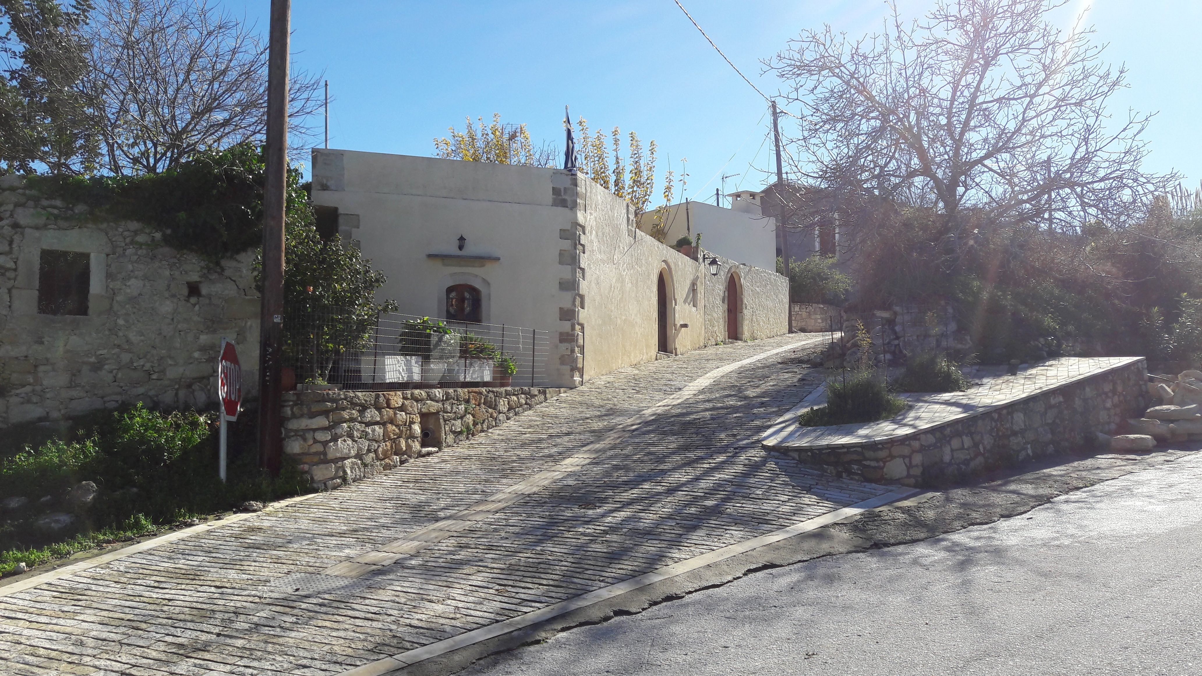 Είσοδος στον οικισμό